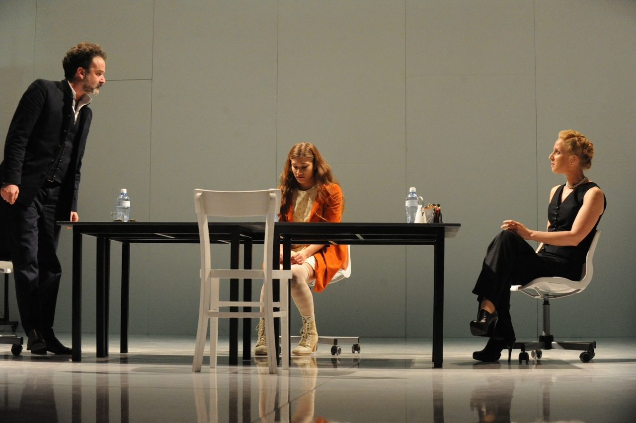 אמיר קריאף, גלוריה בס ושירי גולן בהצגה "איפיגניה" מאת אוריפידס, בבימויו של גדי רול, בתיאטרון באר שבע, 2012